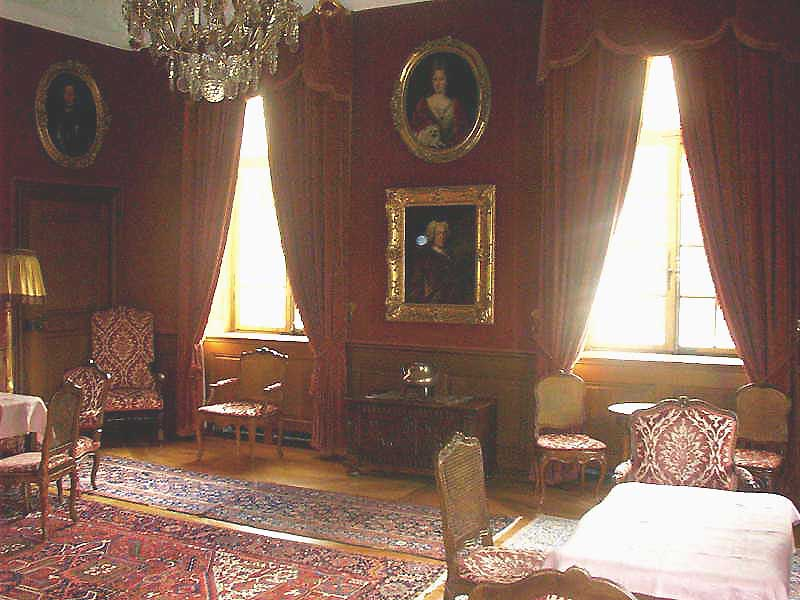 Wenkenhof_Erdgeschoss_Fumoir